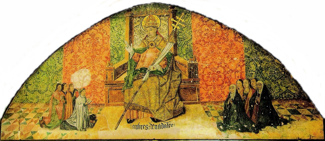 San Gregorio de Osset. Ermita de San Gregorio de Osset. Alcalá del Río.